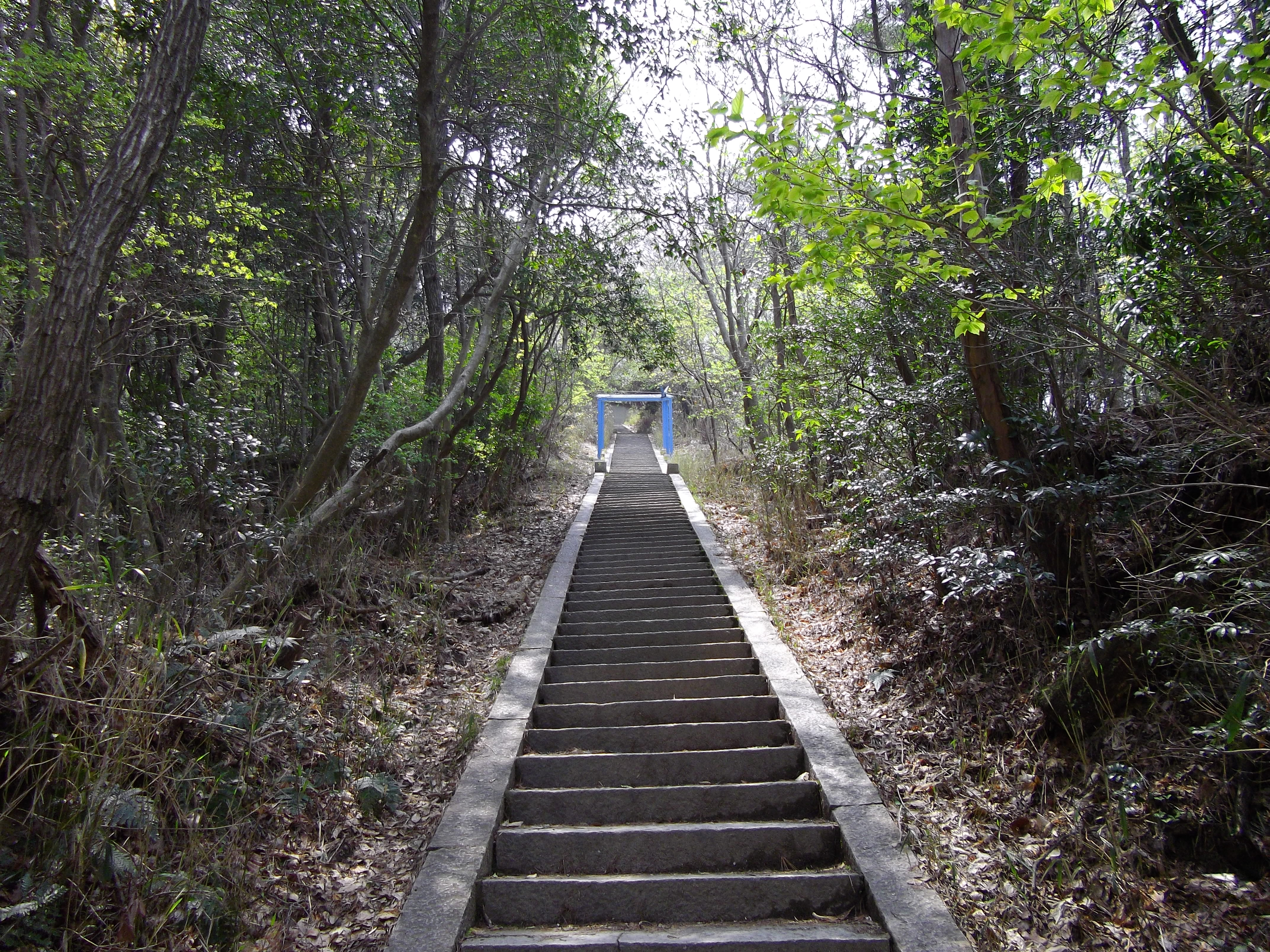 大文字登山道。旧道・新道合流後、最後の石段。これを登ると間もなく火床。この石段は昭和4年に造られたらしい。